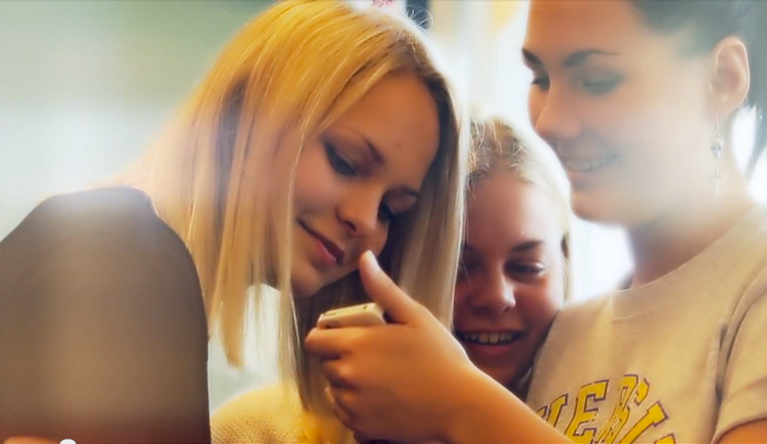 Mobilt lärande